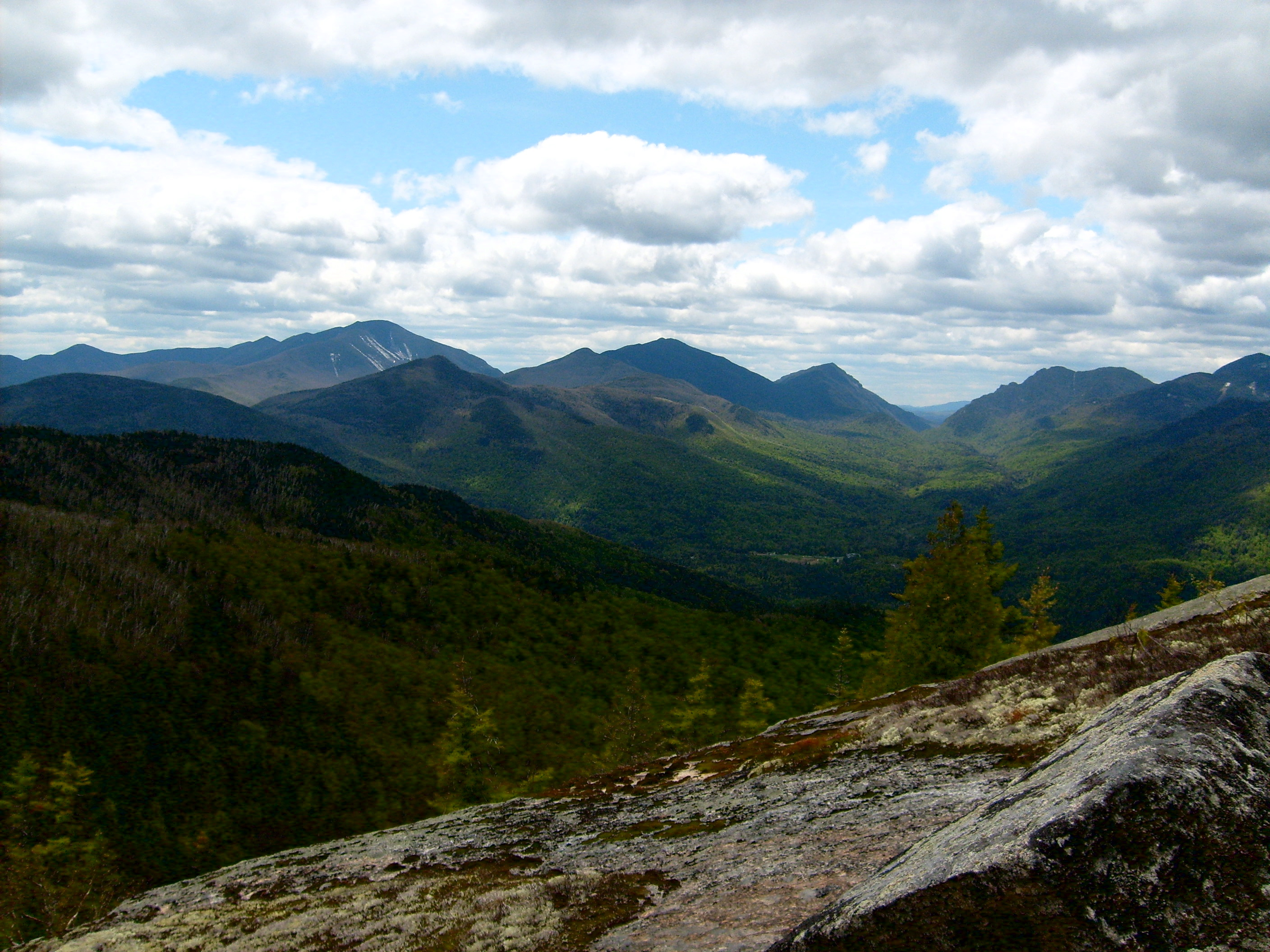 Les adirondacks au printemps 2008